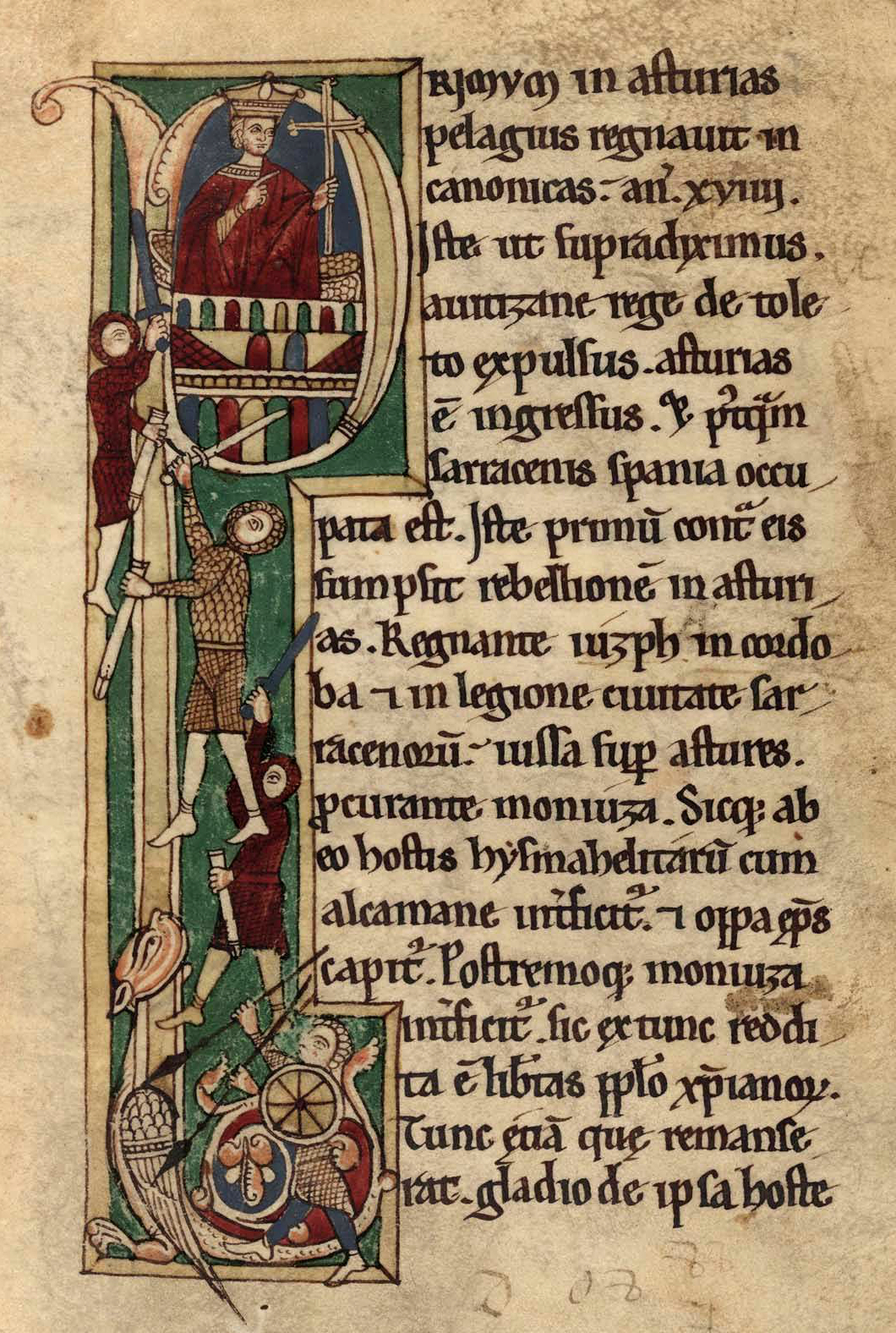 BNE Mss 2805 f 23r. Representa a Don Pelayo en la batalla de Covadonga. Se trata de una de las copias que transmite versión del Corpus pelagianum del obispo Pelayo a partir de un prototipo (incluso en las miniaturas) probablemente elaborado en el scriptorium del obispo Pelayo de Oviedo. La corona responde a modelos de fines del siglo XI, del tipodel que lleva el monarca en el centro de las tablas lunares del mss 17 del St. John’s Colle-ge de Oxford (ca. 1080-1100) como las que se encuentran igualmente en el Liber testametorum, manuscrito realizado por el obispo Pelayo.